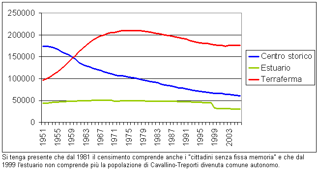 poploc venediku sedin kwartire